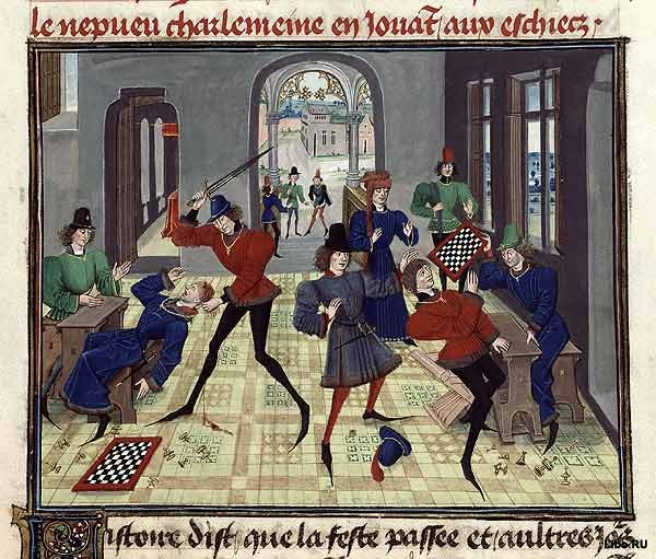 Миниатюра XV века к "Истории Рено де Монтобана"